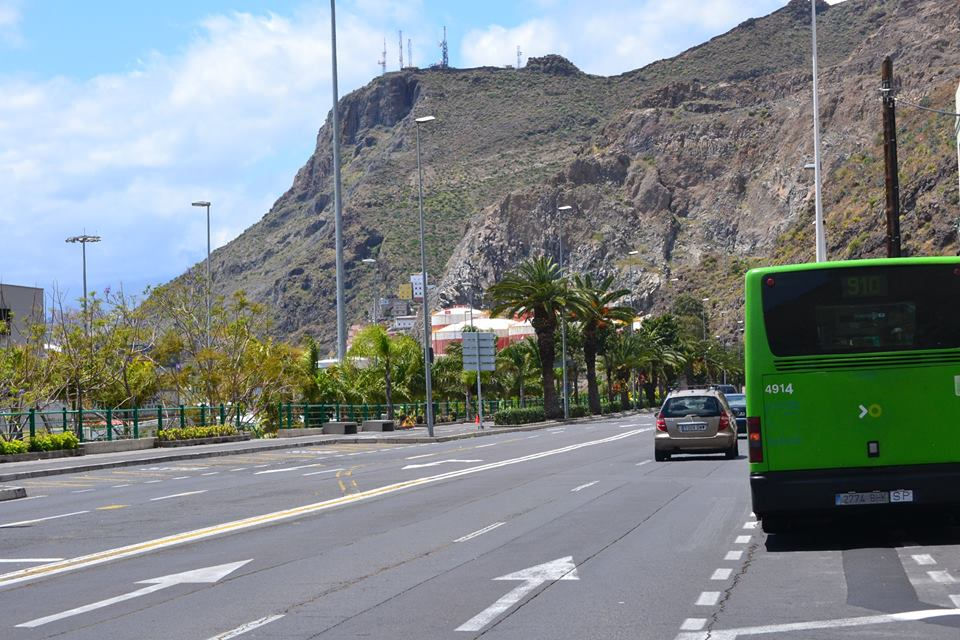 Autovía de San Andrés a la altura de la parada de guagua del barrio de María Jiménez